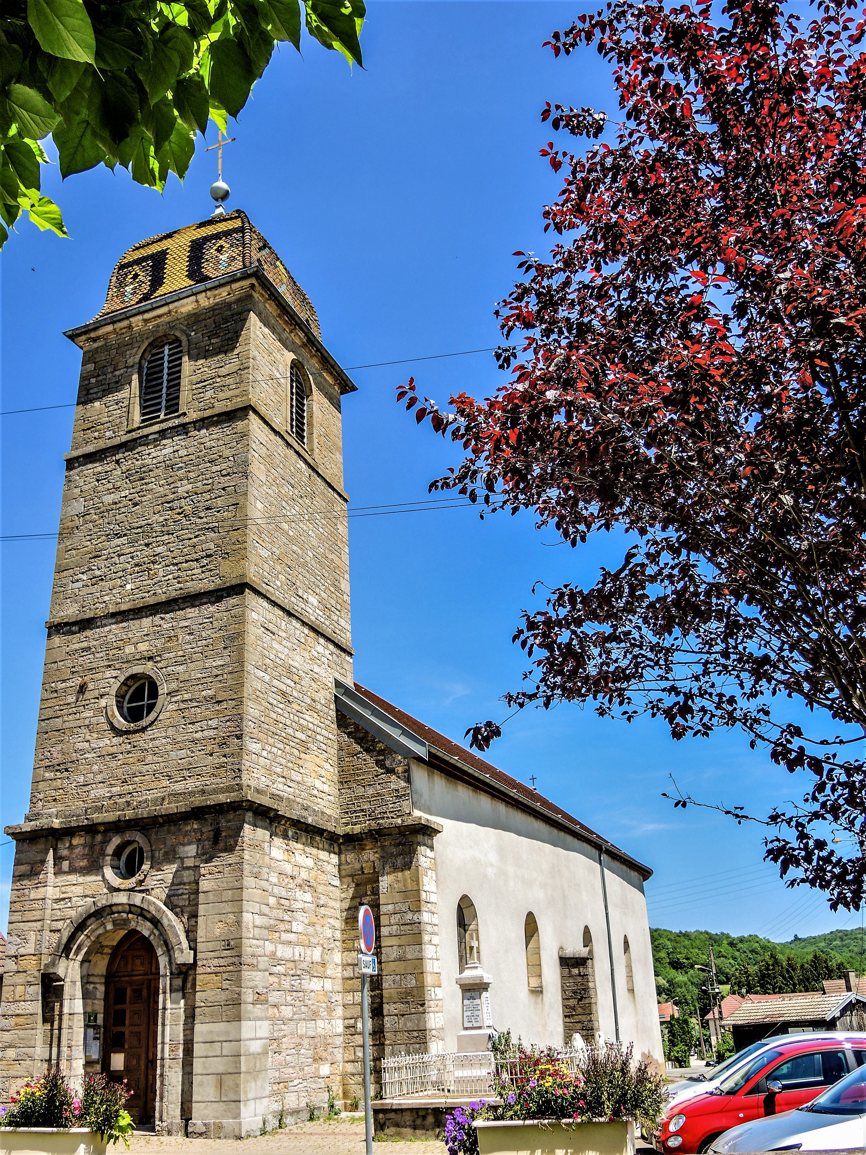 Eglise de Busy